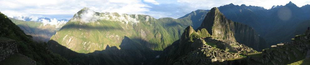 Machu Picchucadora.